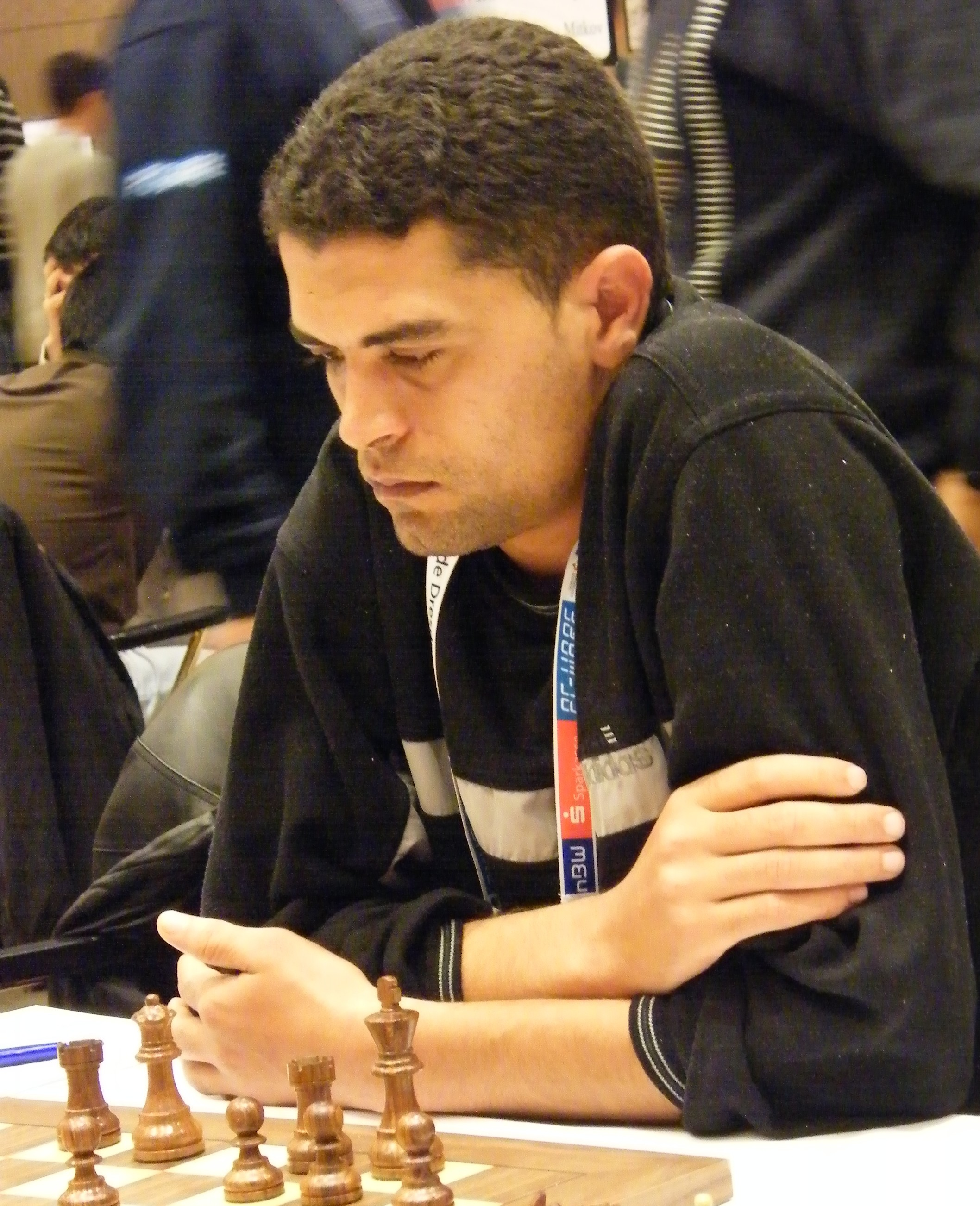 Kamel Njili bei der Schacholympiade 2008 in Dresden